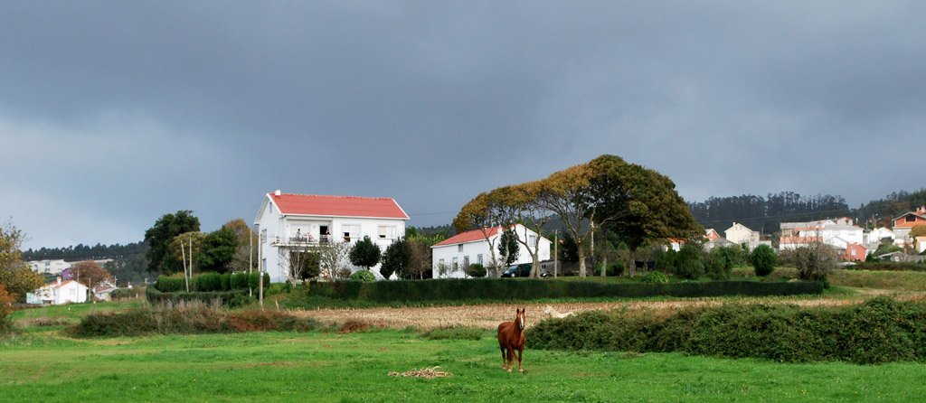 Vista do Castro de Poulo en Valdoviño A Coruña Galiza Spain